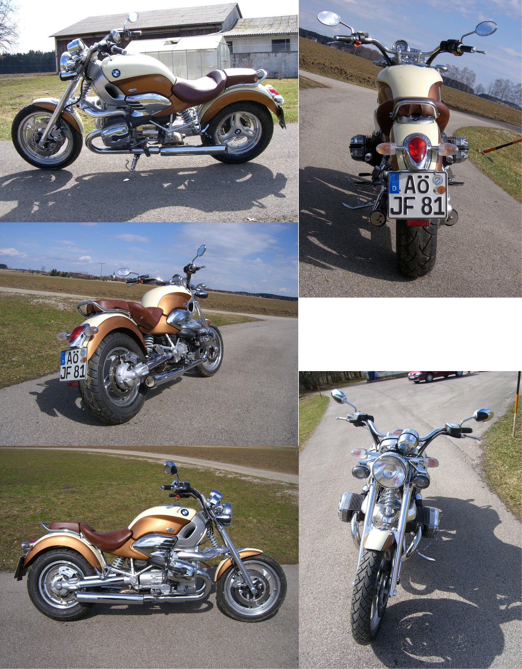 BMW R 1200 C Independent Cruiser Custom